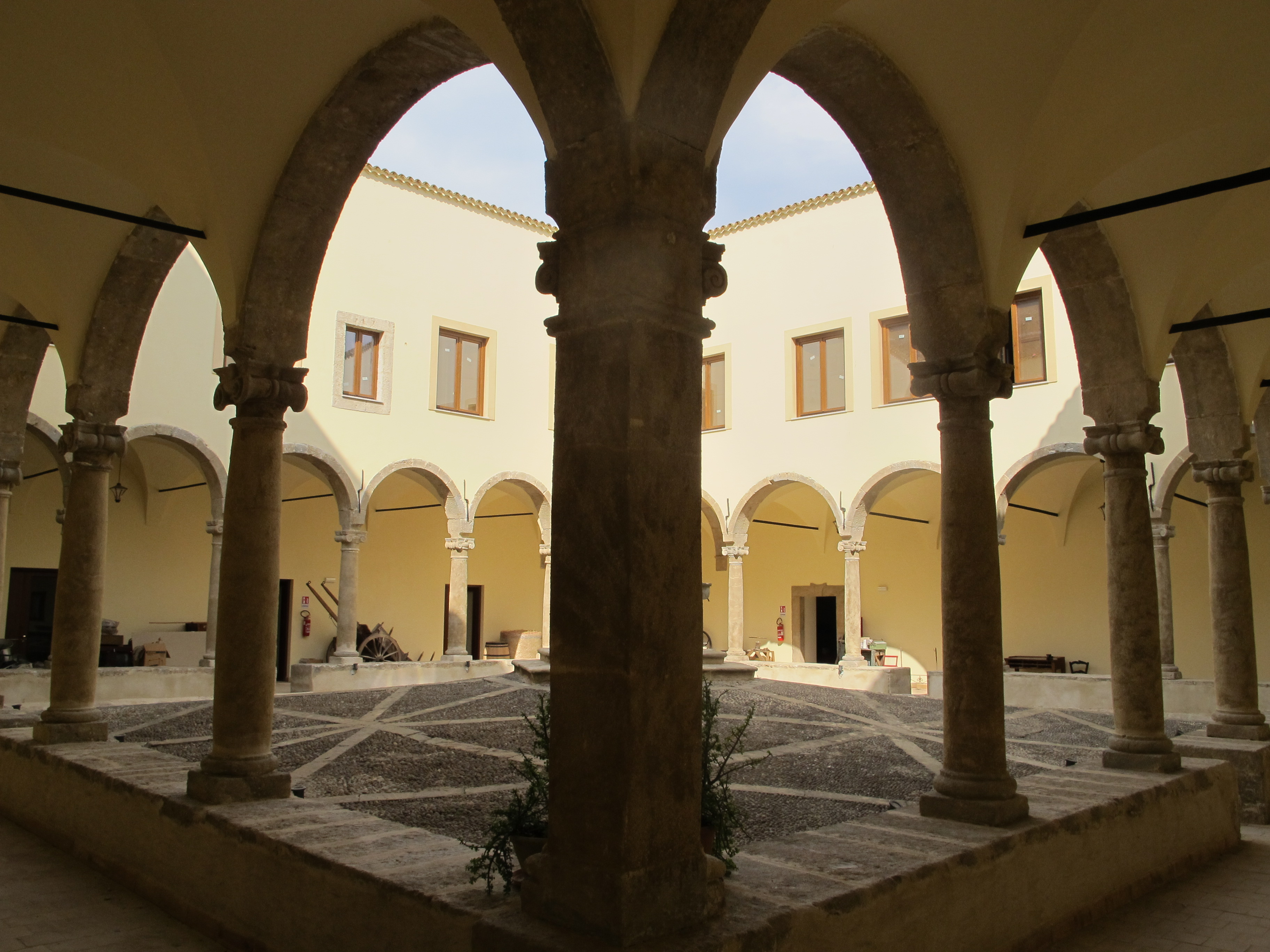 Convento San Francesco This is a photo of a monument which is part of cultural heritage of Italy.